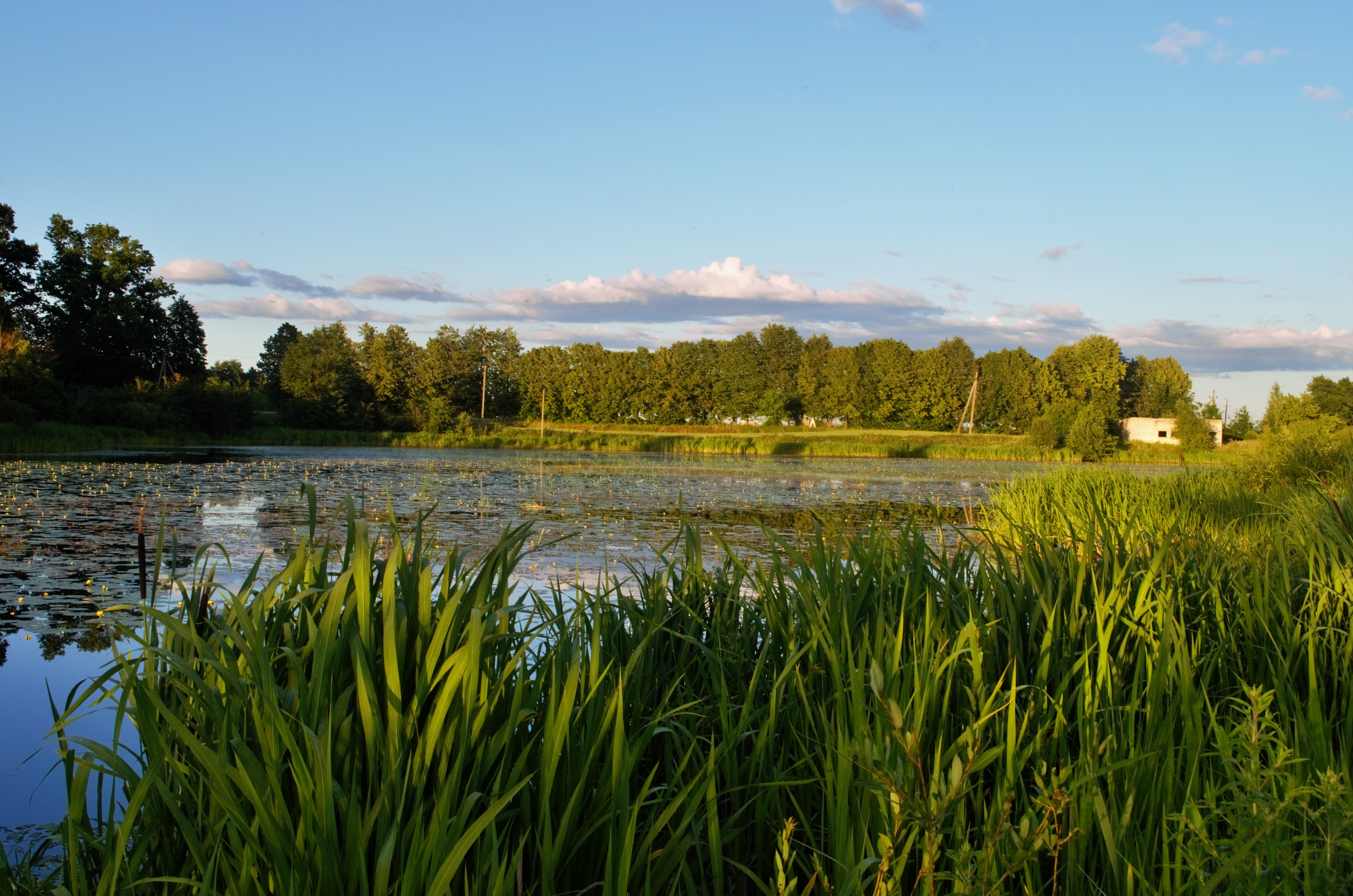 Klamputė ir Keleriškių tvenkinys, Kėdainių raj.